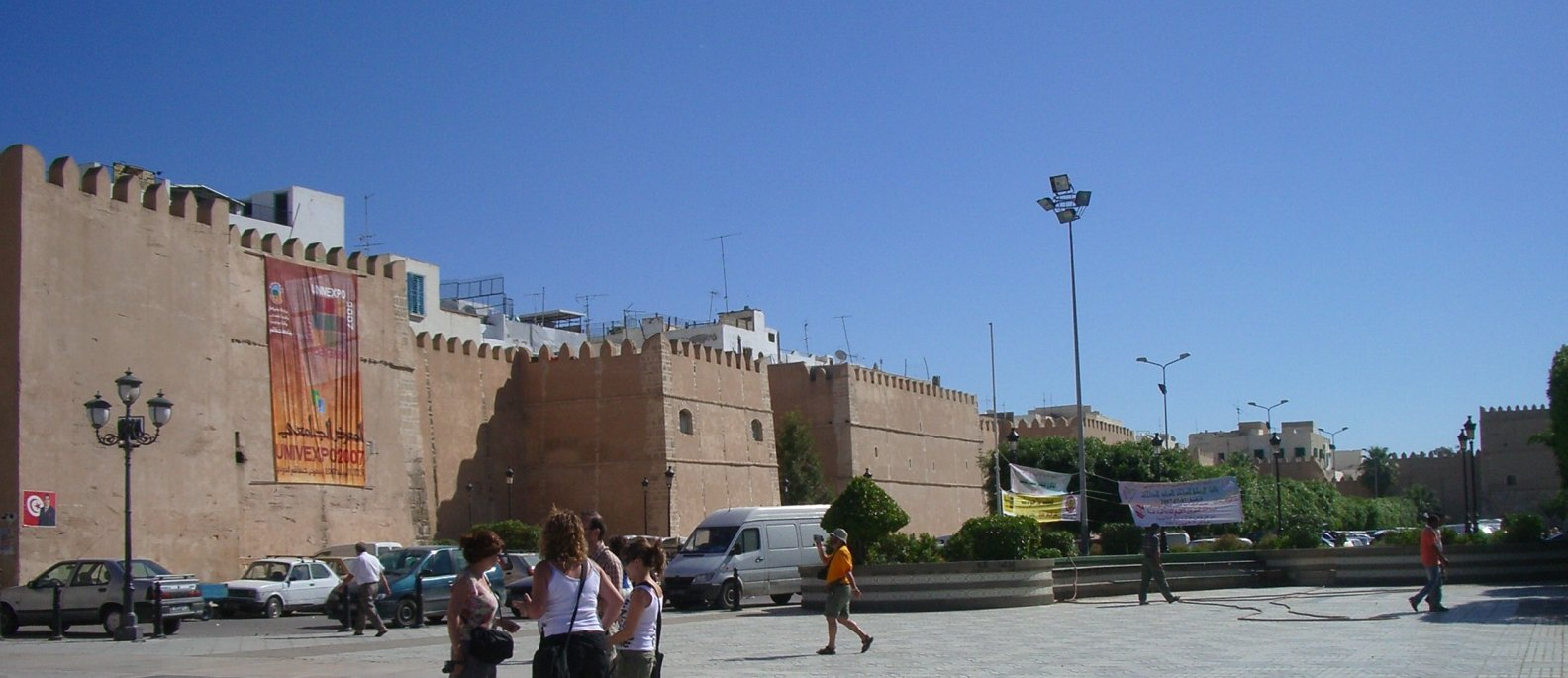 centre de Sfax